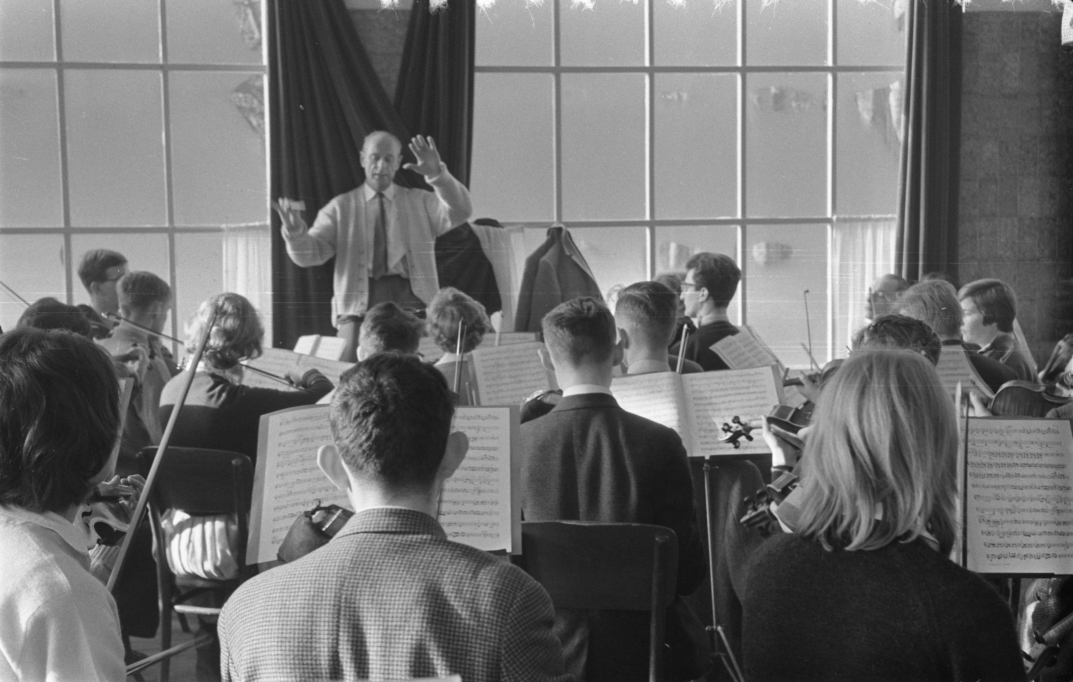 Collectie / Archief : Fotocollectie Anefo Reportage / Serie : [ onbekend ] Beschrijving : Eerste repetitie van het Nederlandse Studentenorkest te Bergen onder leiding van Jan Brussen Datum : 6 januari 1960 Locatie : Bergen Trefwoorden : recepties Persoonsnaam : Brussen, Jan Instellingsnaam : Nederlands Studenten Orkest Fotograaf : Pot, Harry / Anefo Auteursrechthebbende : Nationaal Archief Materiaalsoort : Negatief (zwart/wit) Nummer archiefinventaris : bekijk toegang 2.24.01.05 Bestanddeelnummer : 910-9202